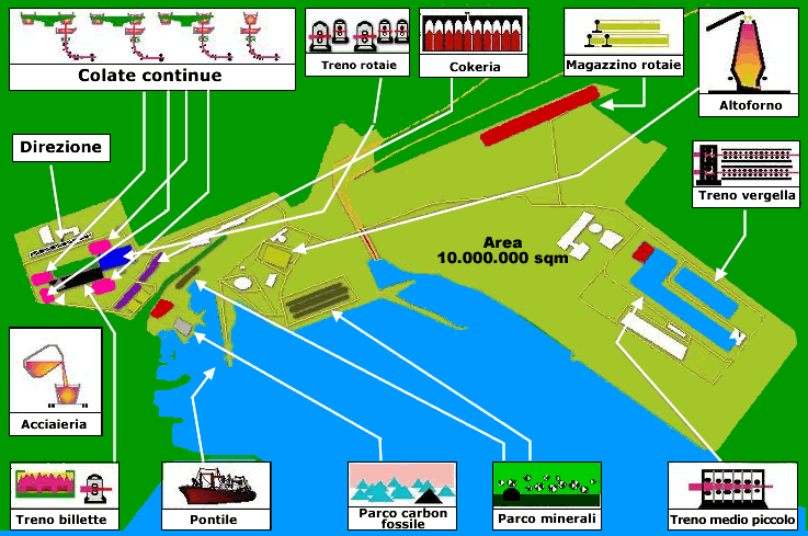 Mappatura dello stabilimento siderurgico di piombino